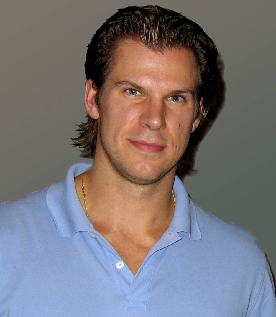 österreichischer Eishockeyspieler Andre Lakos